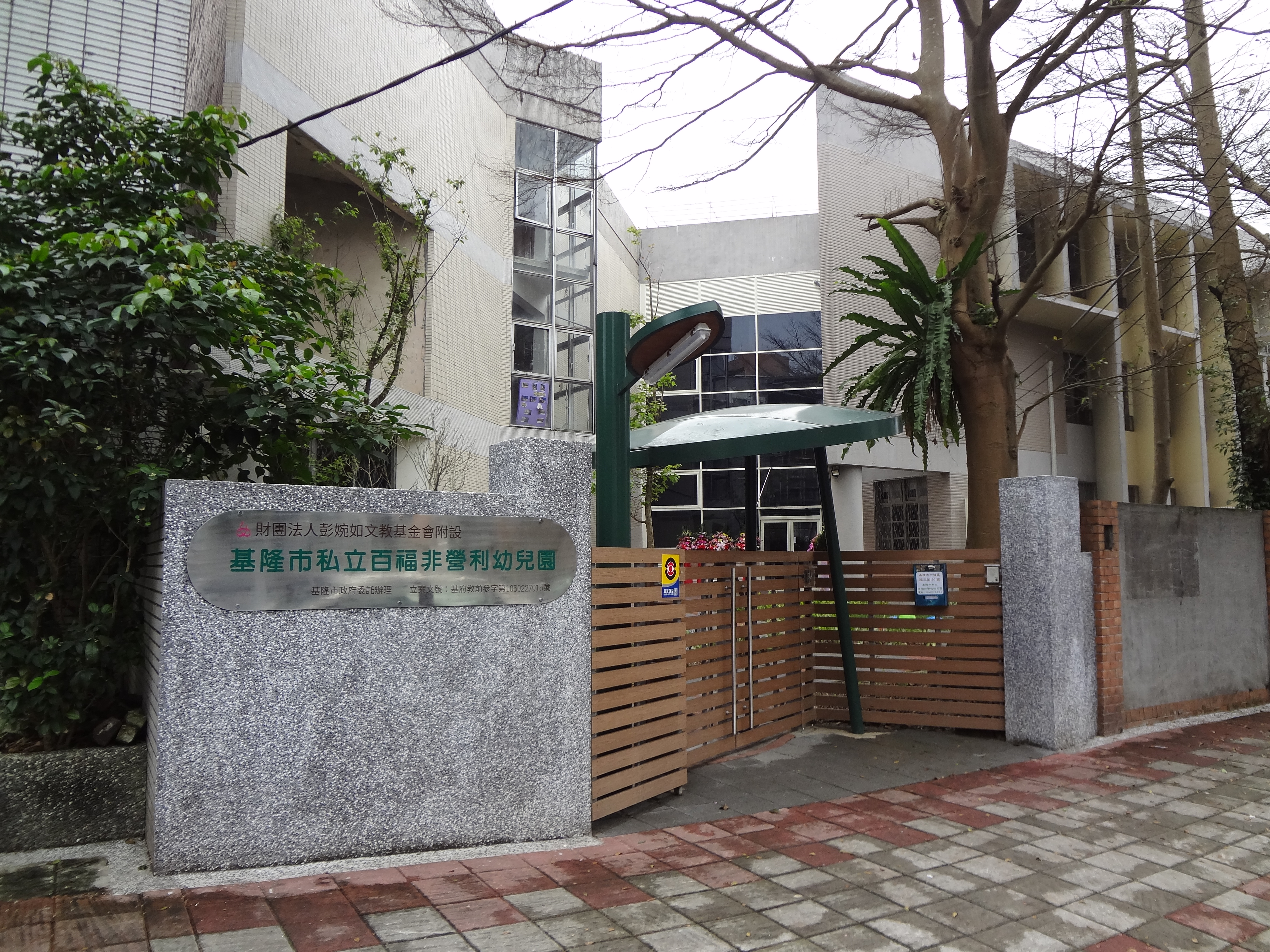 基隆市私立百福非營利幼兒園，是基隆市首家非營利幼兒園，由基隆市政府委託彭婉如文教基金會承辦，2017年3月31日揭牌，位於基隆市七堵區福三街90號，使用基隆市立百福國民中學校地。